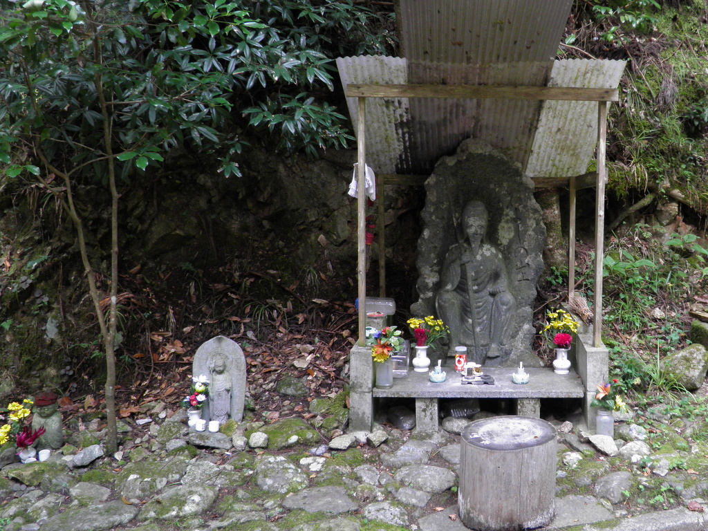 芋ヶ峠（奈良県高市郡明日香村）